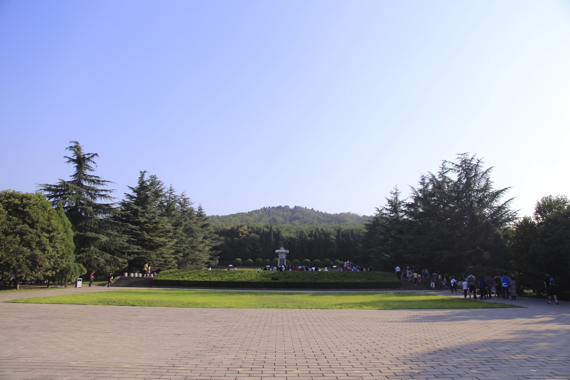 秦始皇帝陵封土北側正面